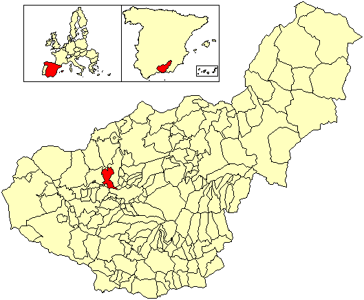 Situación del término municipal de Atarfe respecto a la provincia de Granada, en España.